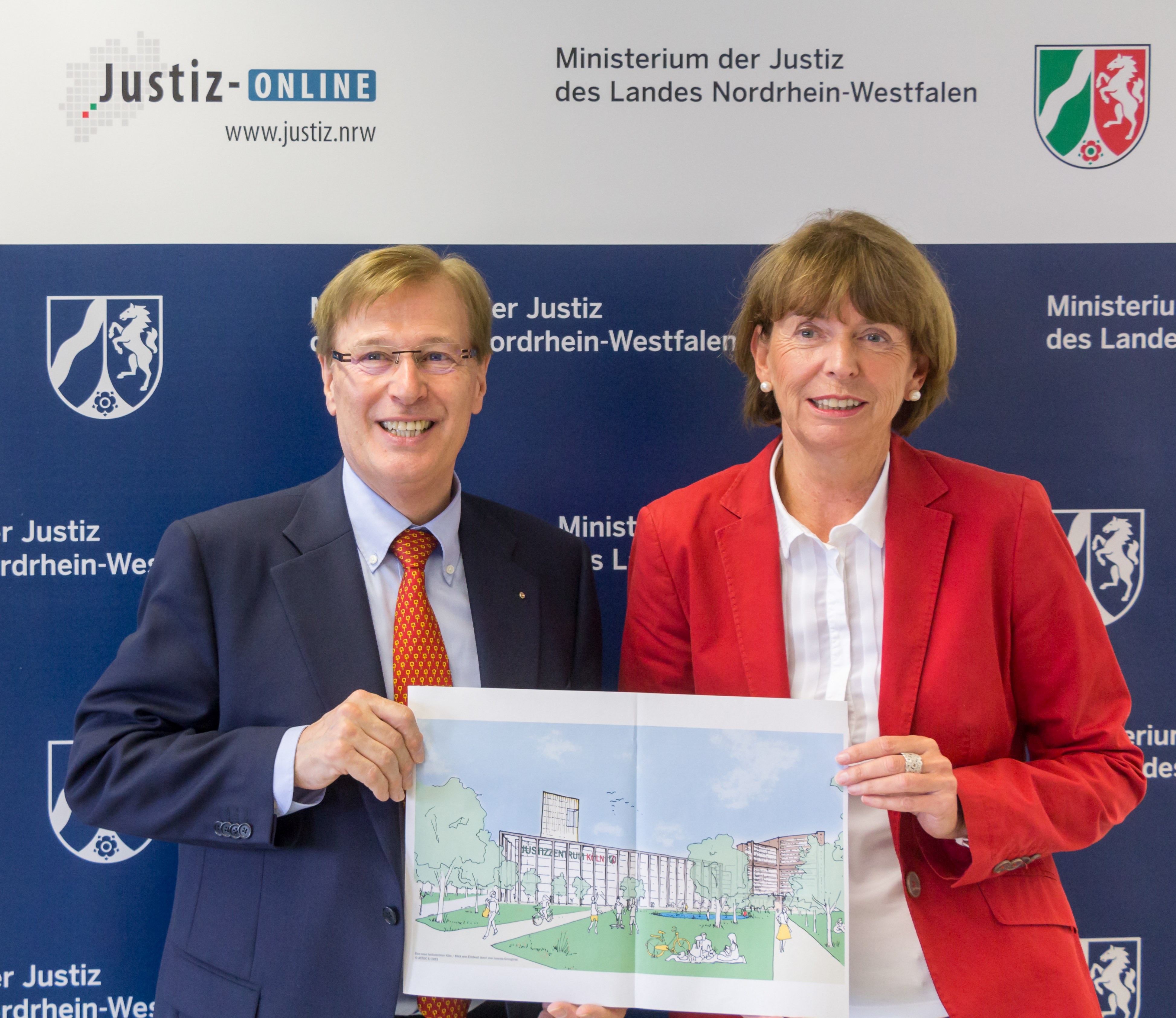 Mediengespräch über den Planungsstand des Justizzentrums Köln Foto: Peter Biesenbach (NRW-Justizminister) und Henriette Reker (Oberbürgermeister von Köln)